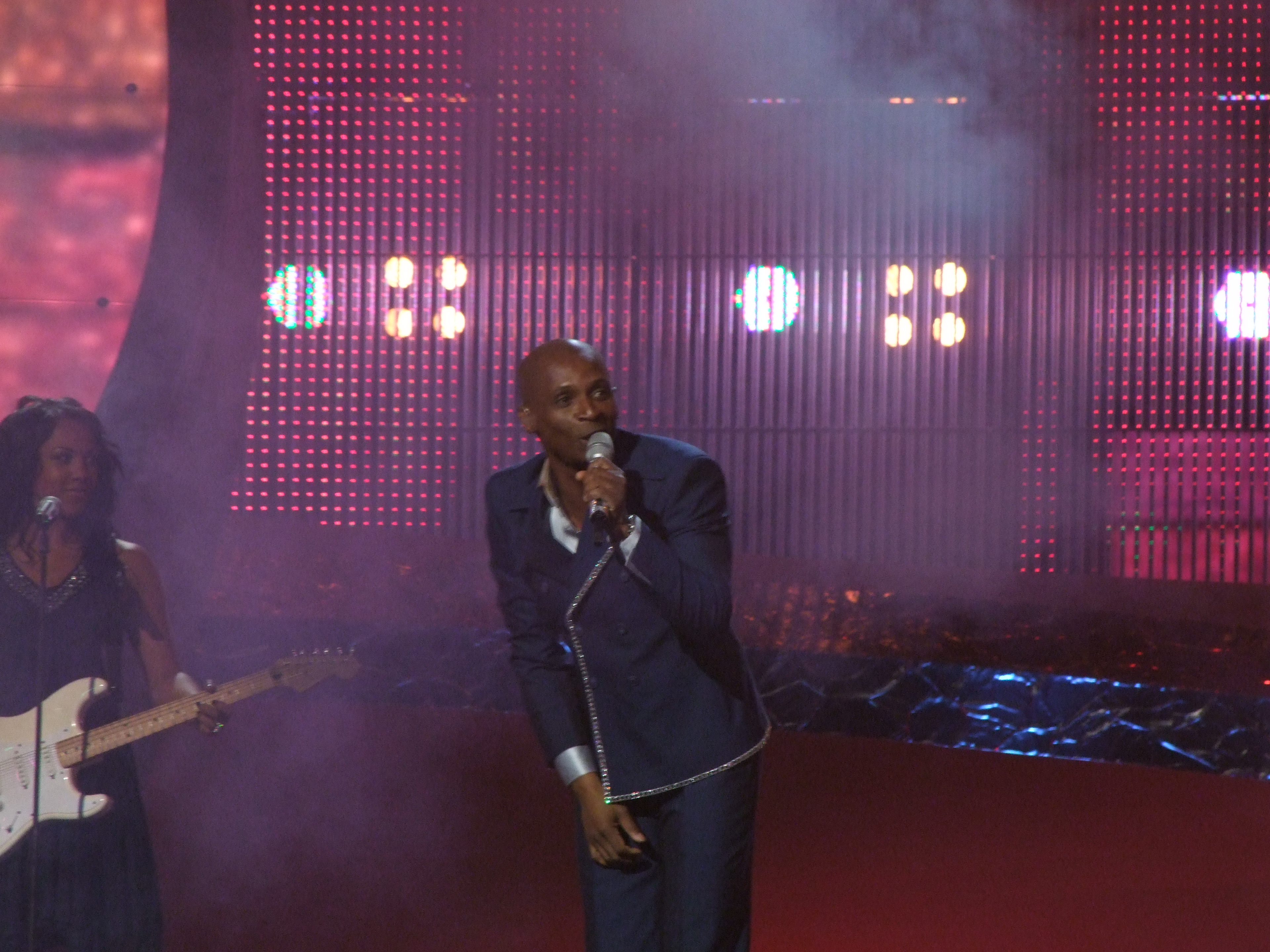 Final Eurovision 2008